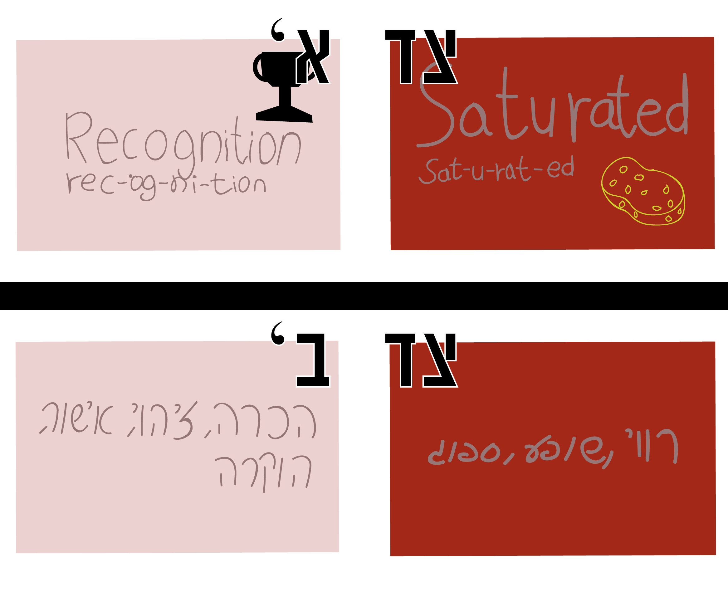 שני כרטיסים דו צדדיים בעליי דוגמאות שונות.